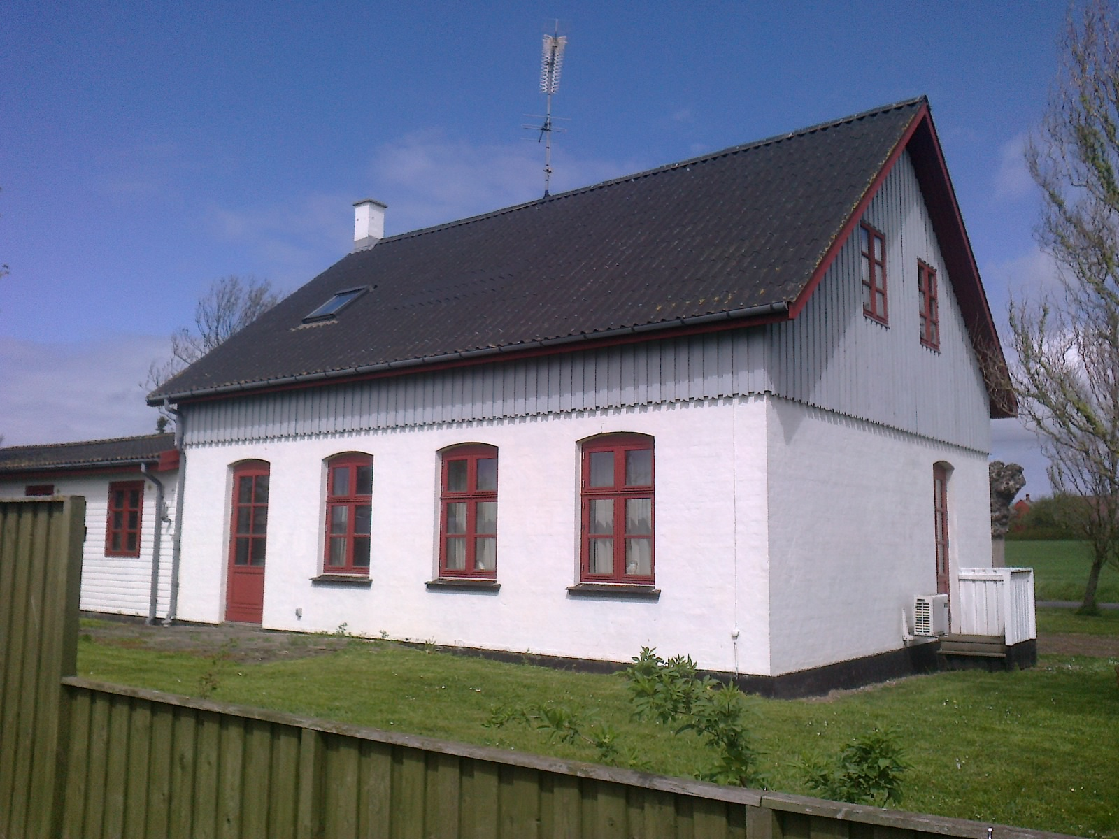 Bodilsker Station, sporside